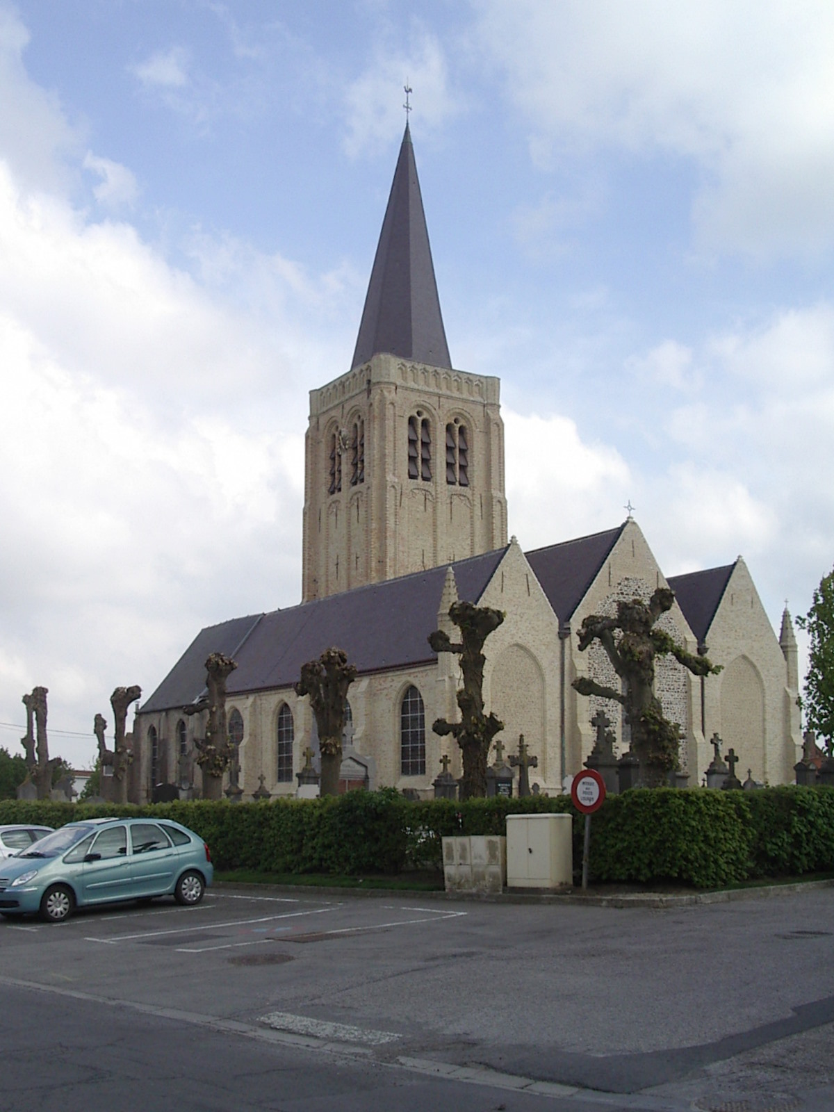 Eglise de Killem (France, Nord)